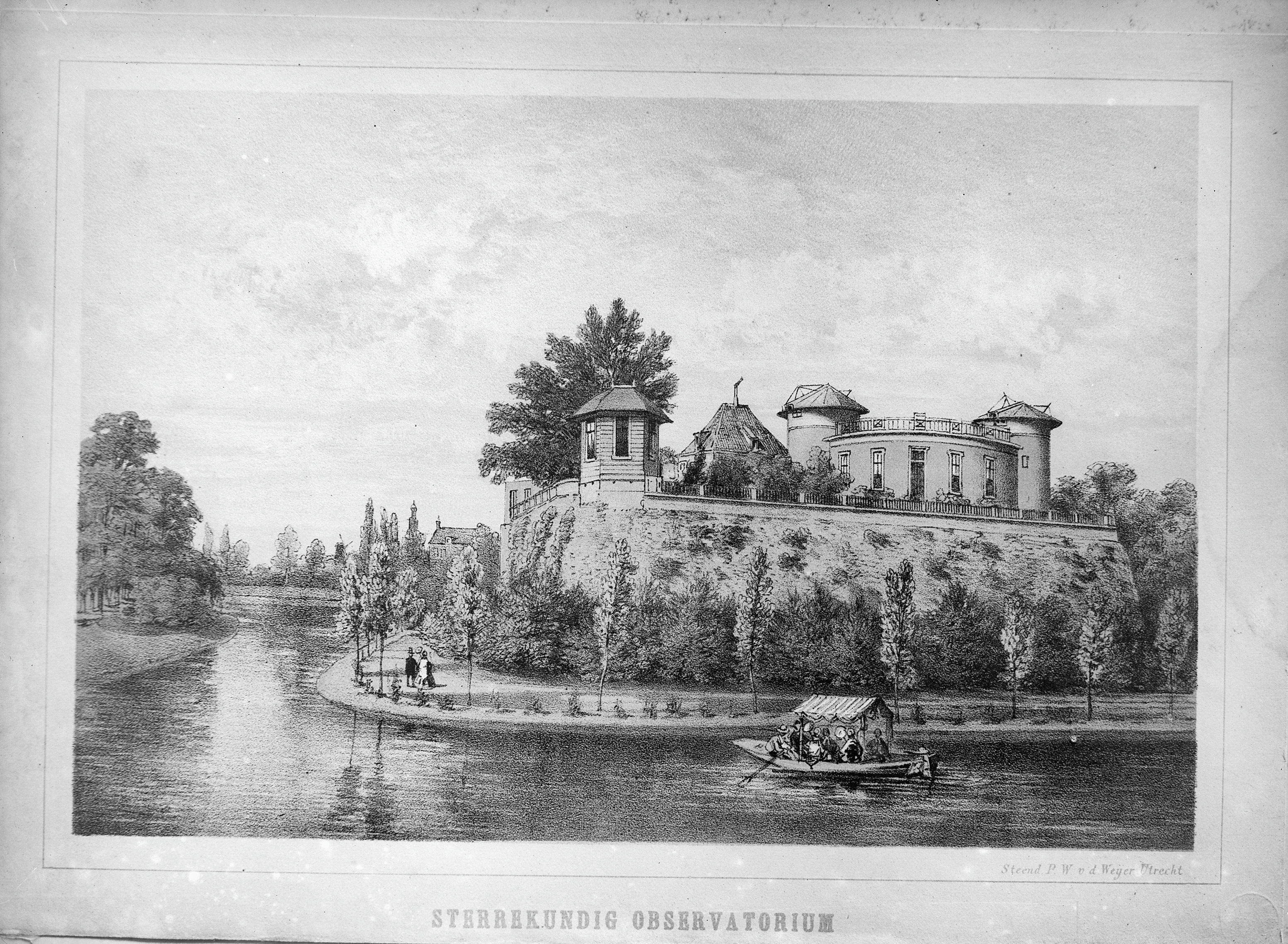 Zonnenburg: Zonnenburg "Sterrekundig Observatorium", steendruk door P.W.v.d.Weyer in het Gemeente archief, catalogus topografische atlas nummer 485